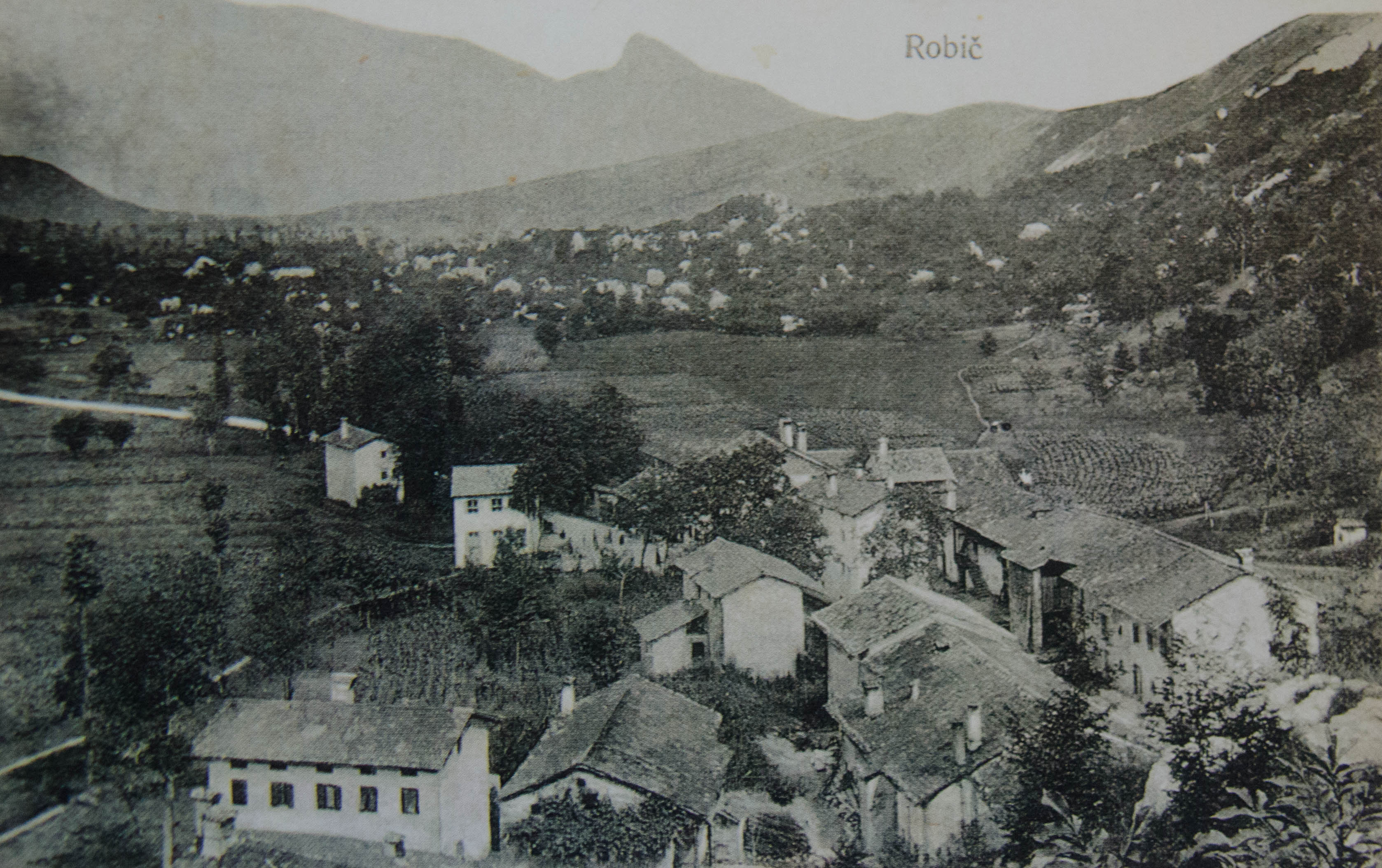 Razglednica Robiča.